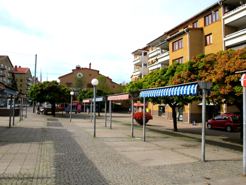 Olskrokstorget i Olskroken i Göteborg